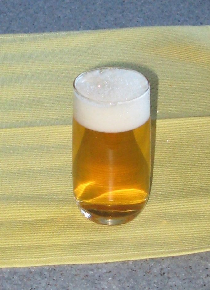 E Glas Béier.